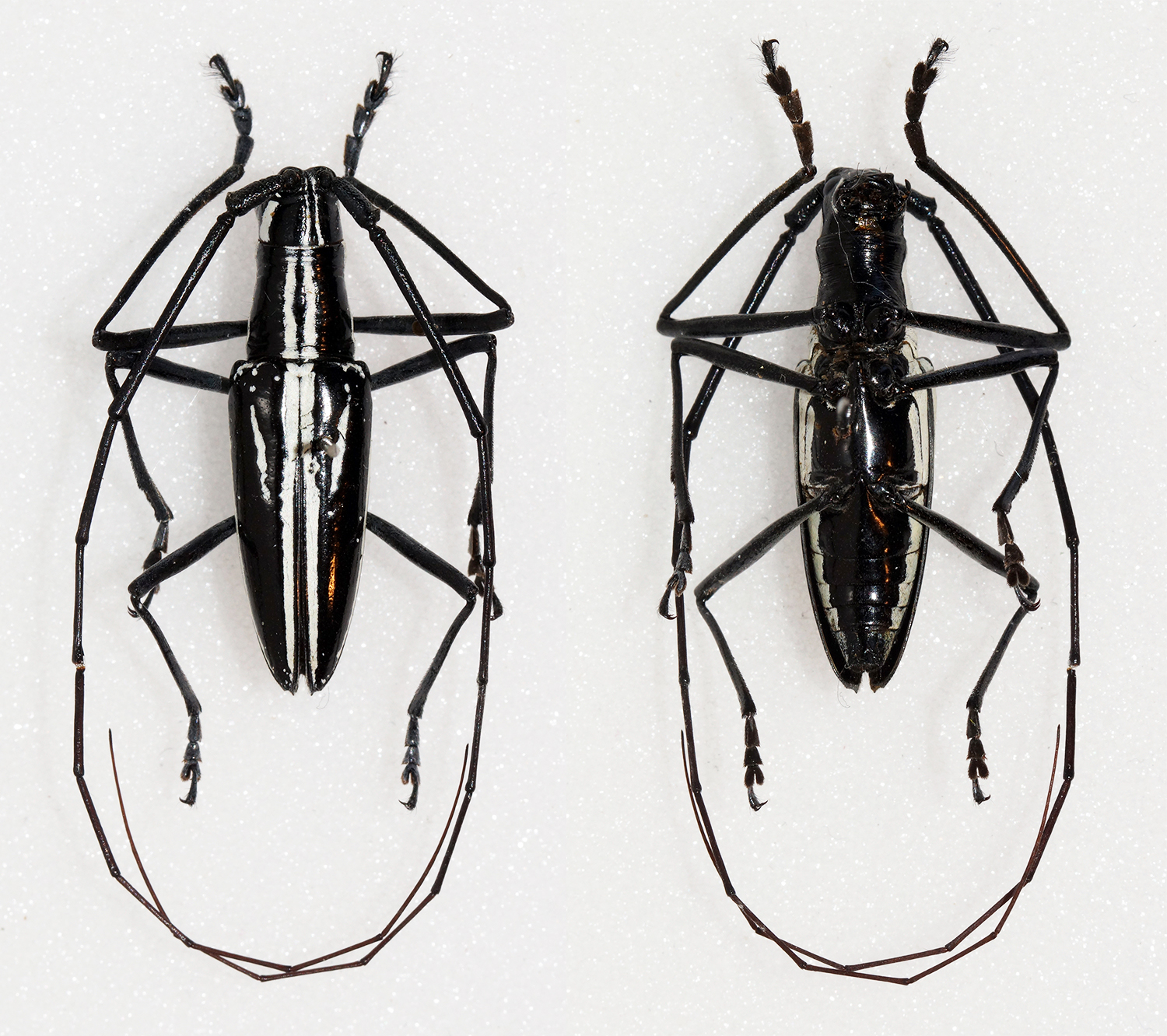 Bates,1880 Sex: Male Data: 06-2014 - Cerro Bellavista - 1200m - Rio Guacimo - Lomas de Guacimo - Atlantic Slope - Limon Prov - Costa Rica Size: 22mm